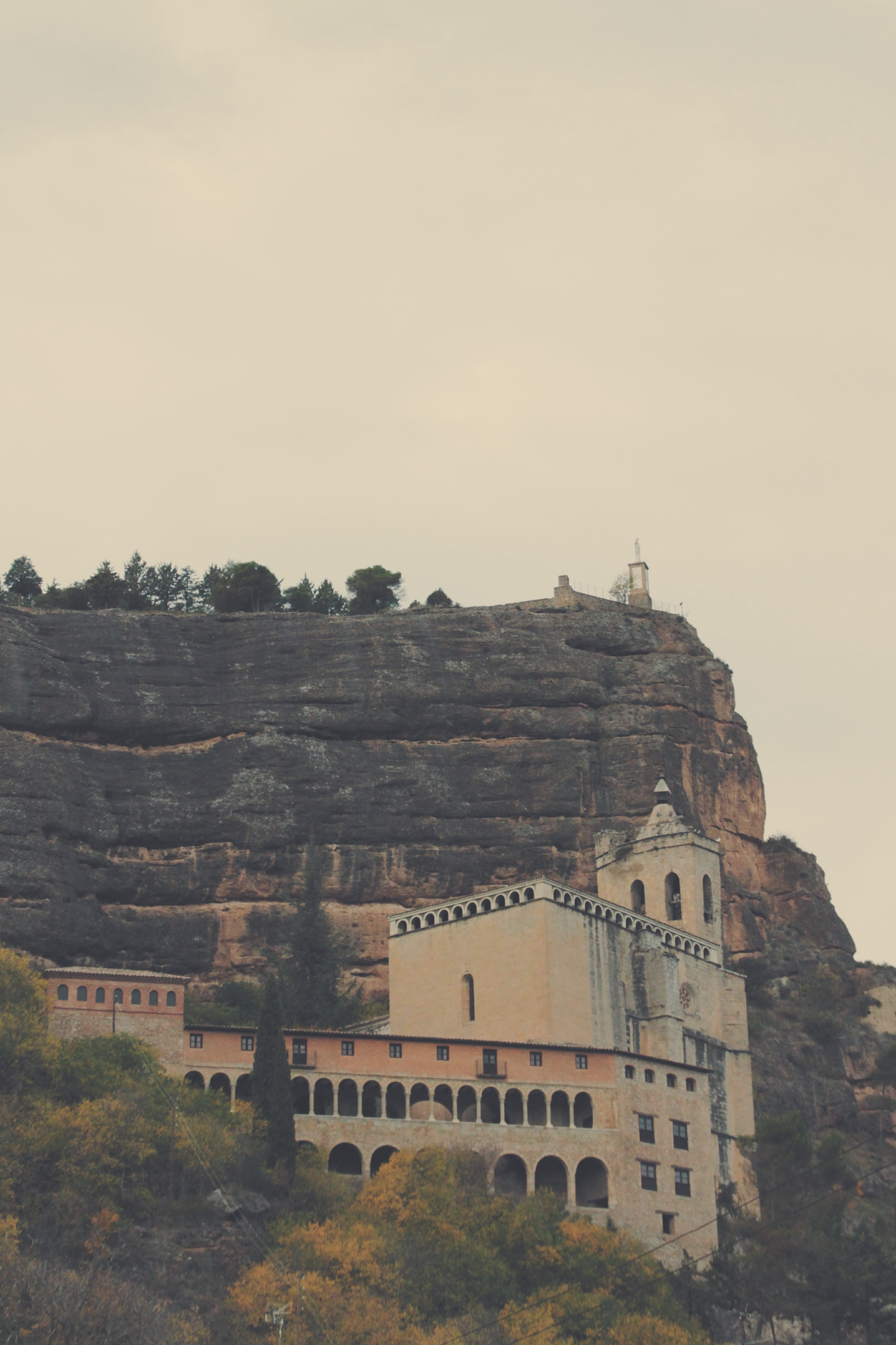 Graus.